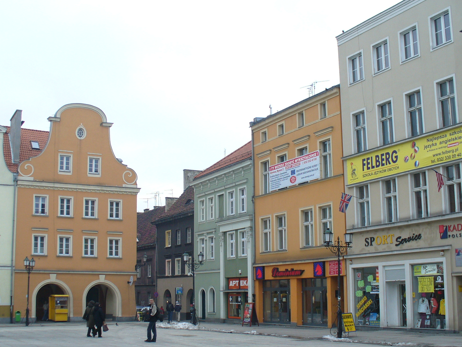 Gliwice (Gleiwitz) - kamienice na rynku